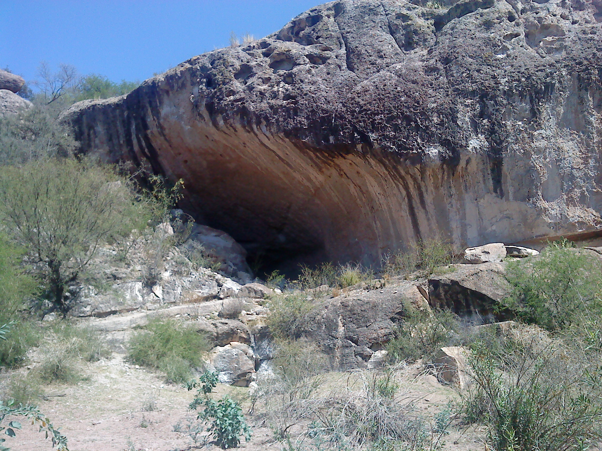 Esta es la cueva mas importante a las cercanias del pueblo del cucurpe donde habitaban tribus antiguas